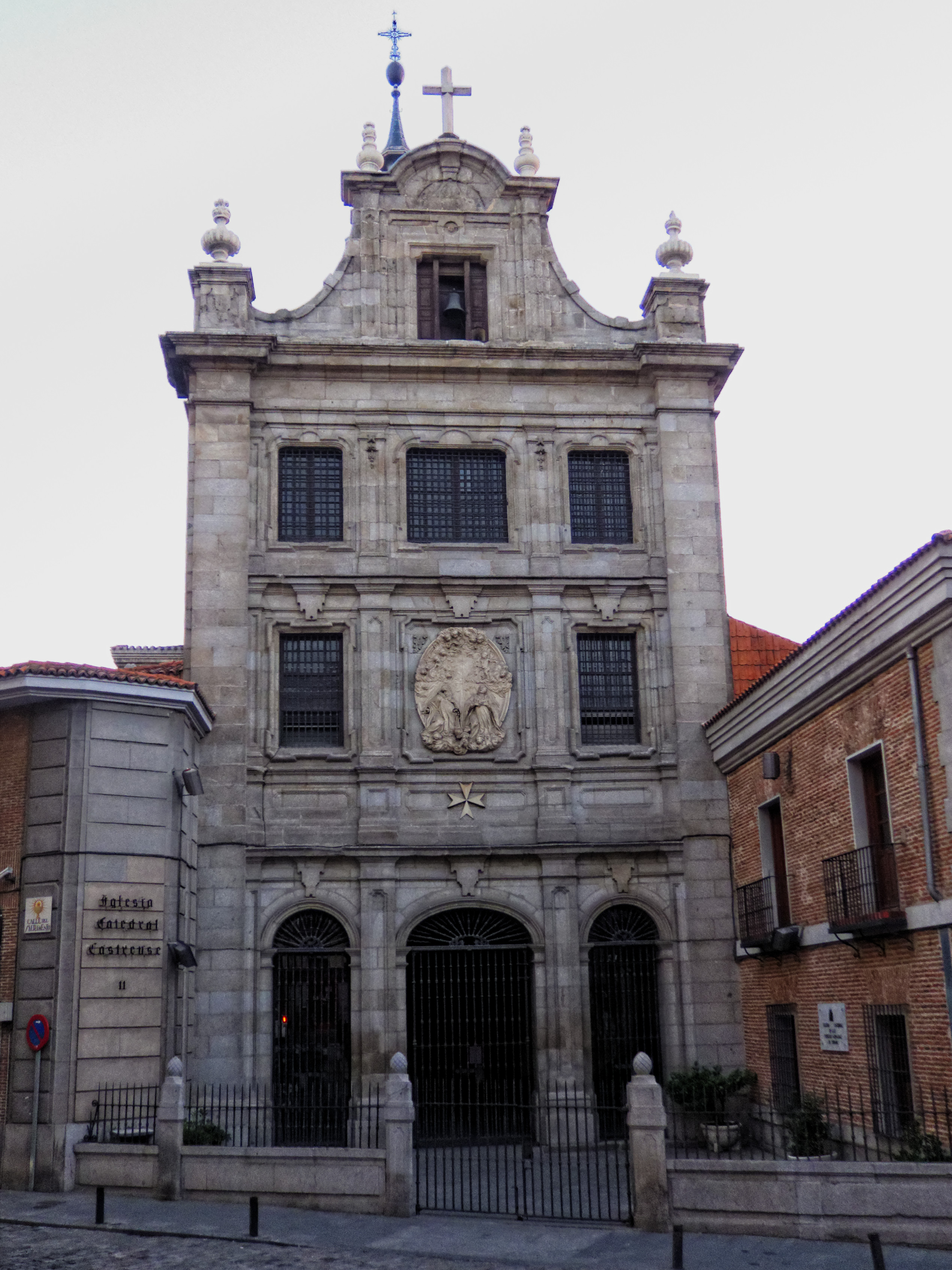 Iglesia Catedral de las Fuerzas Armadas (Iglesia del sacramento), Madrid.